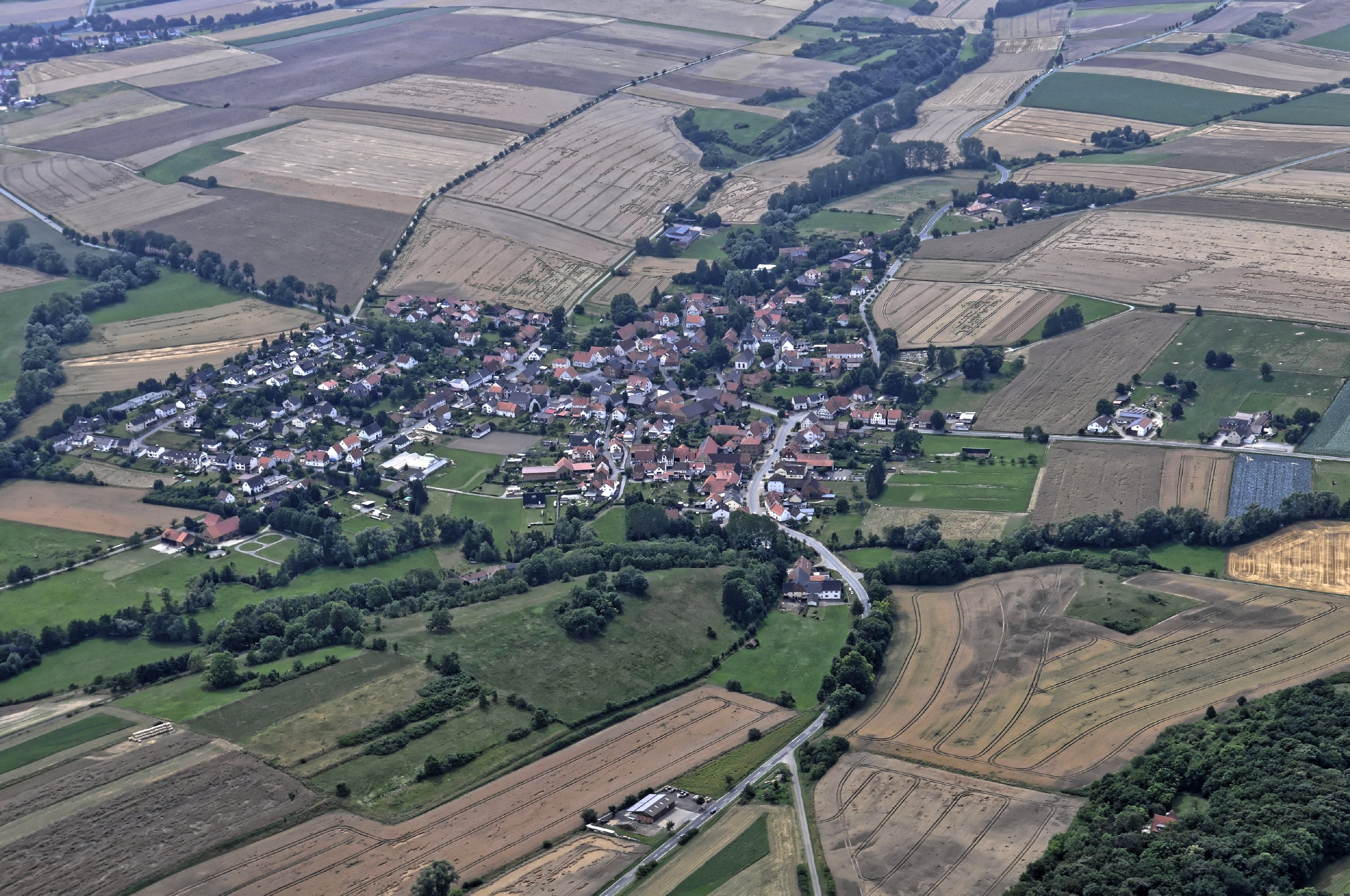 Bilder vom Flug Nordholz-Hammelburg 2015: Niedermeiser